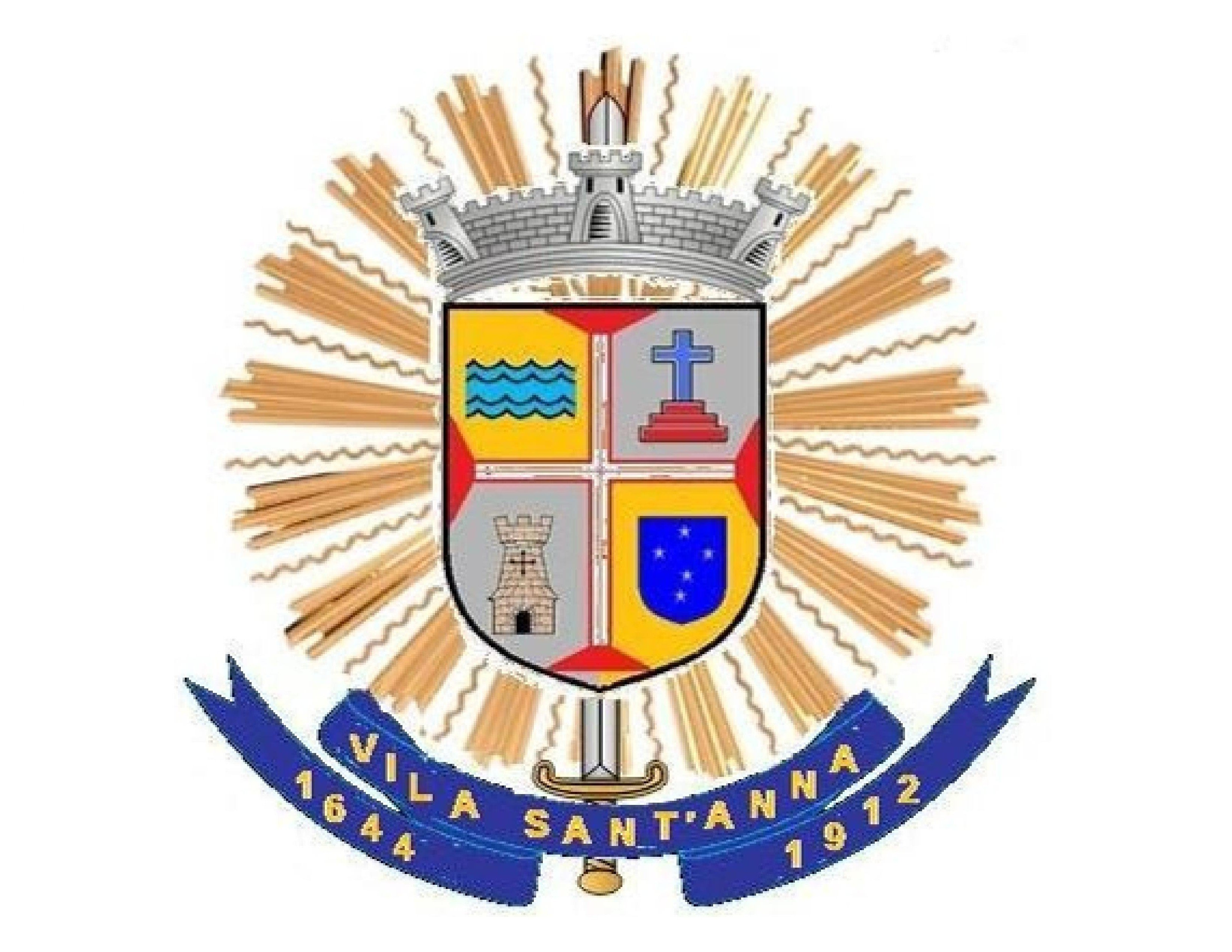 Escudo de Armas da Vila Santana, em Itaquera, São Paulo, Brasil